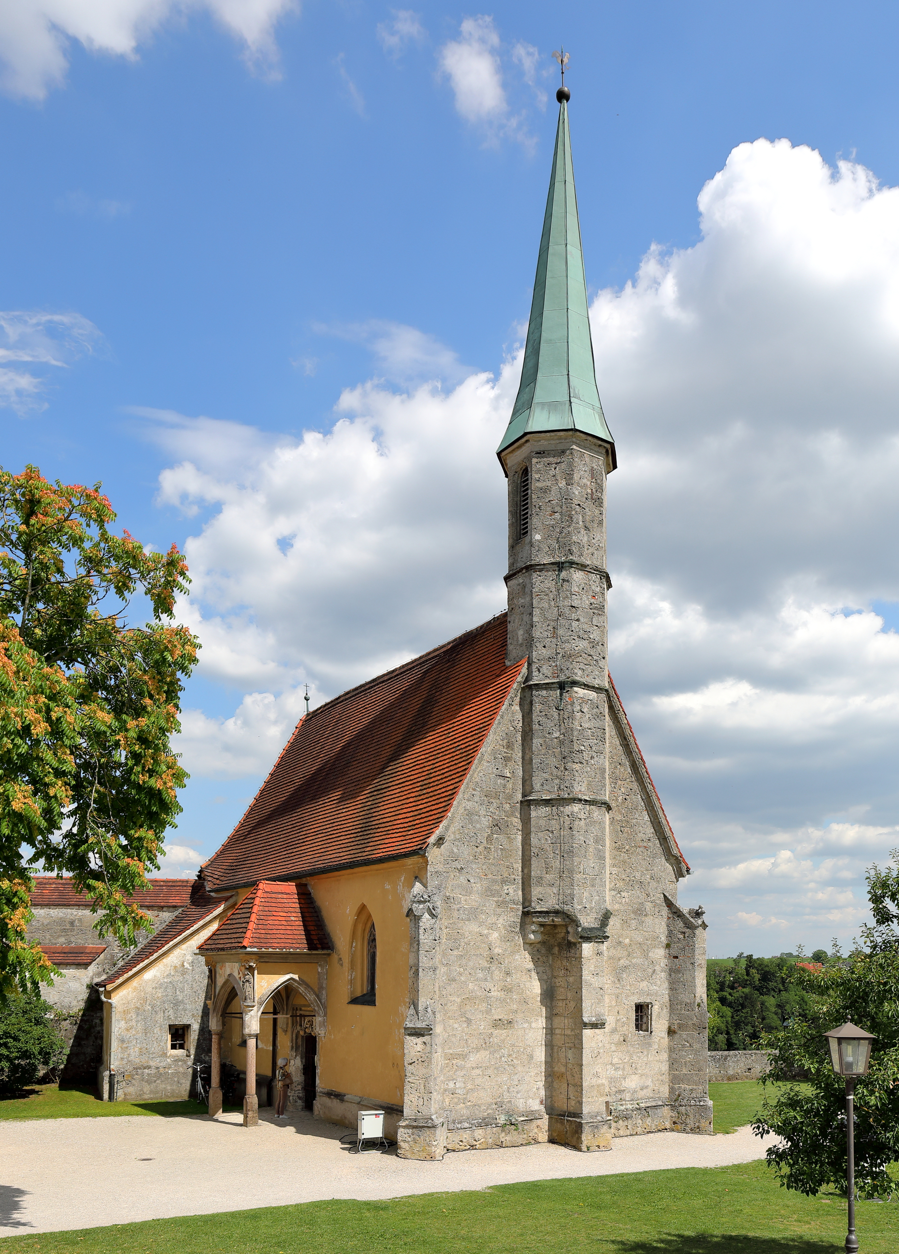 Die aus dem Ende des 15. Jahrhunderts stammende Hedwigskapelle bzw. äußere Burgkapelle St. Maria im vierten Vorhof der Burg zu Burghausen in der deutschen Herzogstadt Burghausen im oberbayerischen Landkreis Altötting.